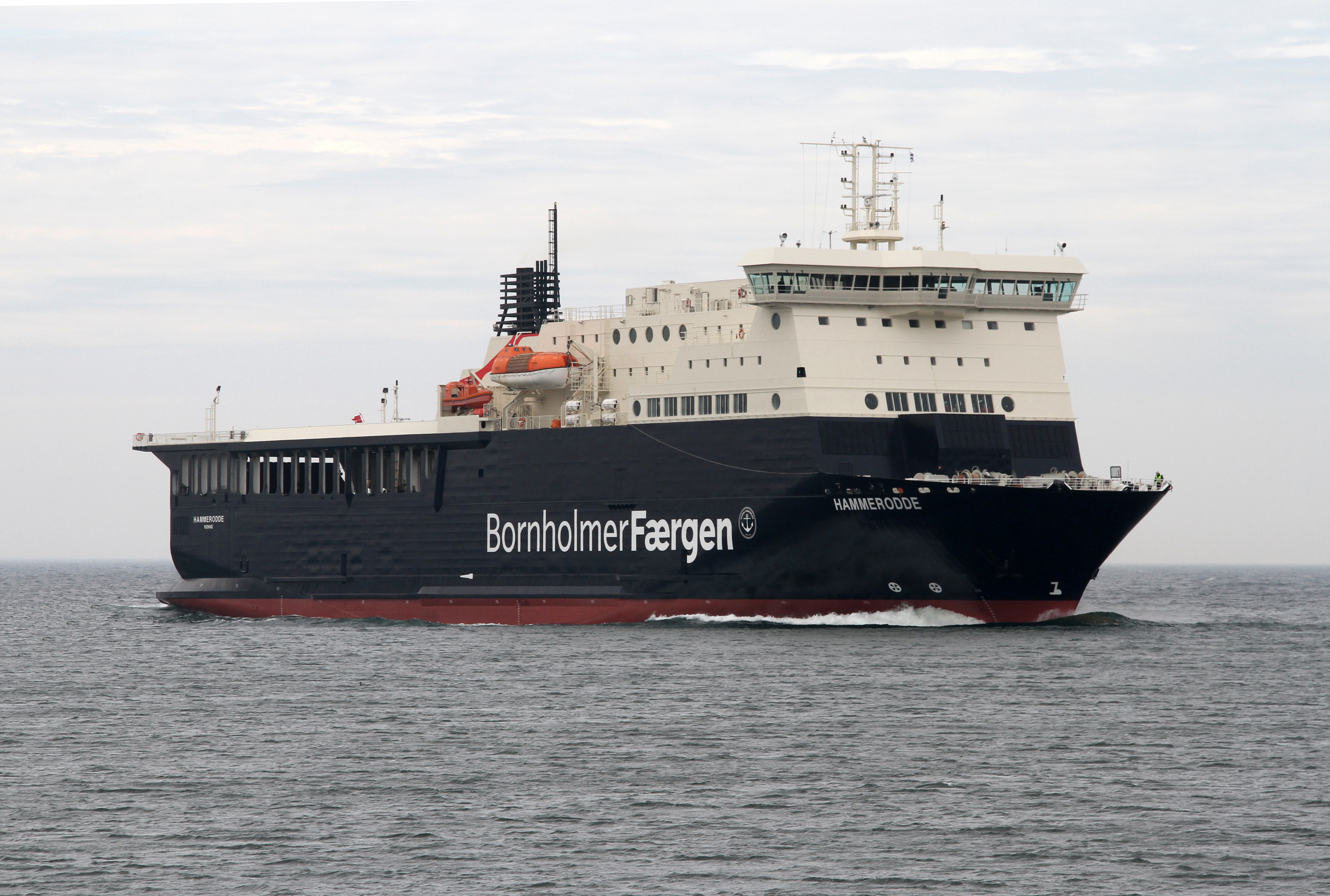 Hammerodde